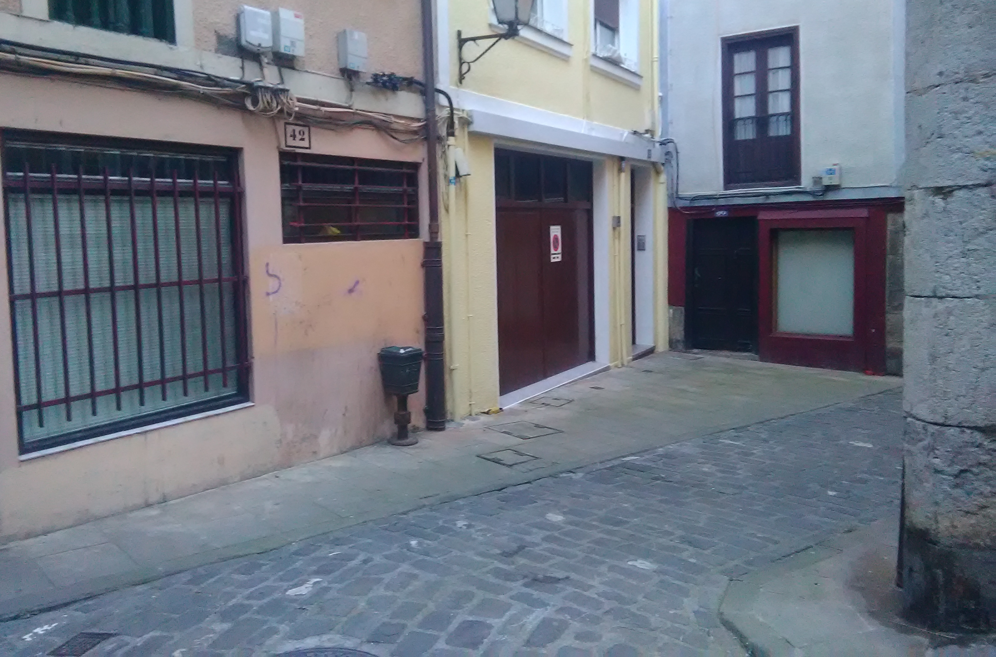 Confluencia al final de la calle Beaskokalea con Dendari (Lequeitio, Vizcaya, España), pintada en 1907 por Eduardo Chicharro y Agüera.